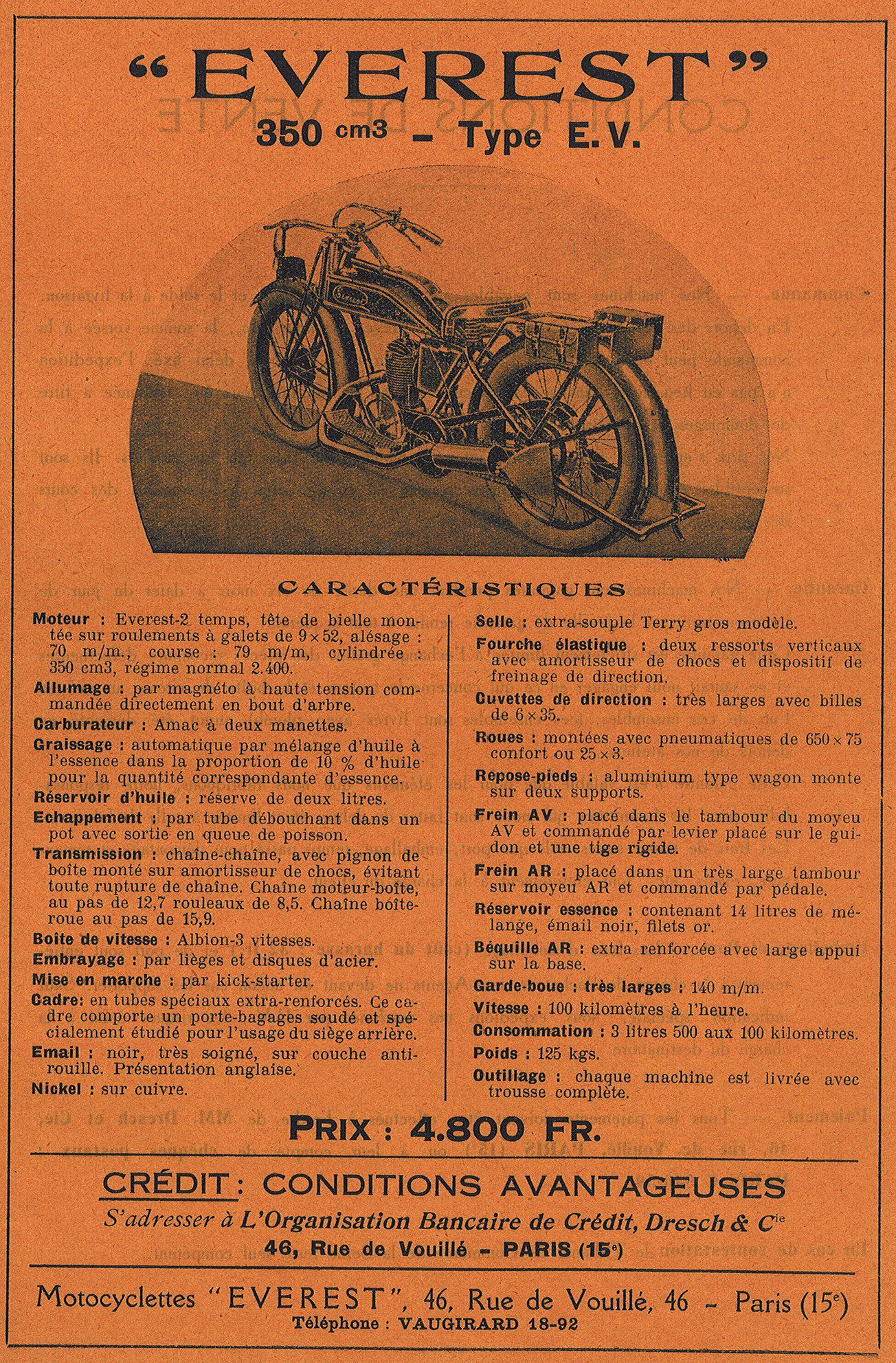 Publicité pour moto 350 Everest modèle EV